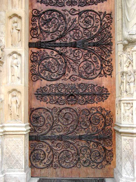 Notre-Dame de Paris. Pentures du vantail nord du portail du Jugement